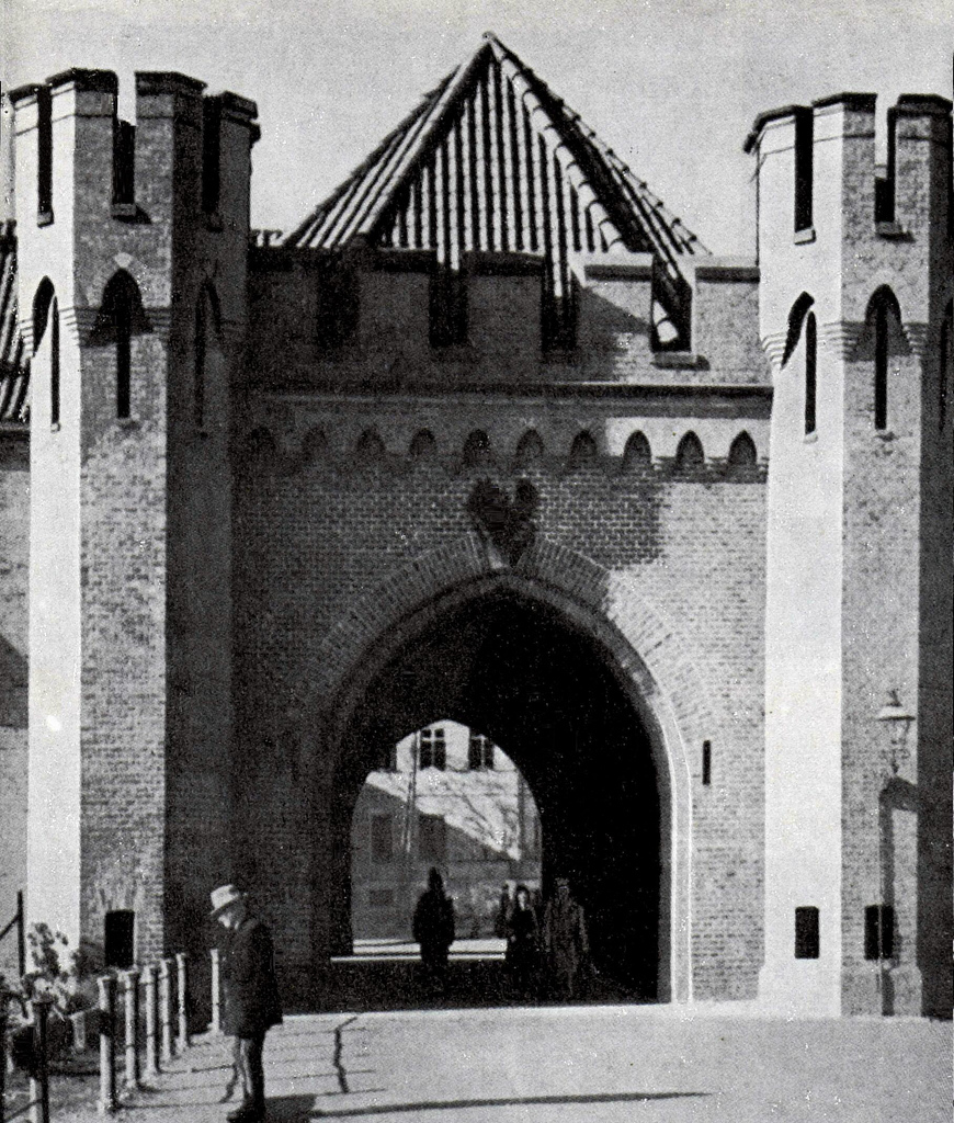 Das Sackheimer Tor von Außen